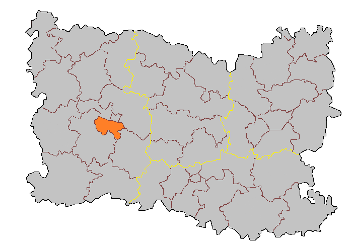 Кантон Бове-Сюд-Уэст на карте департамента Уаза